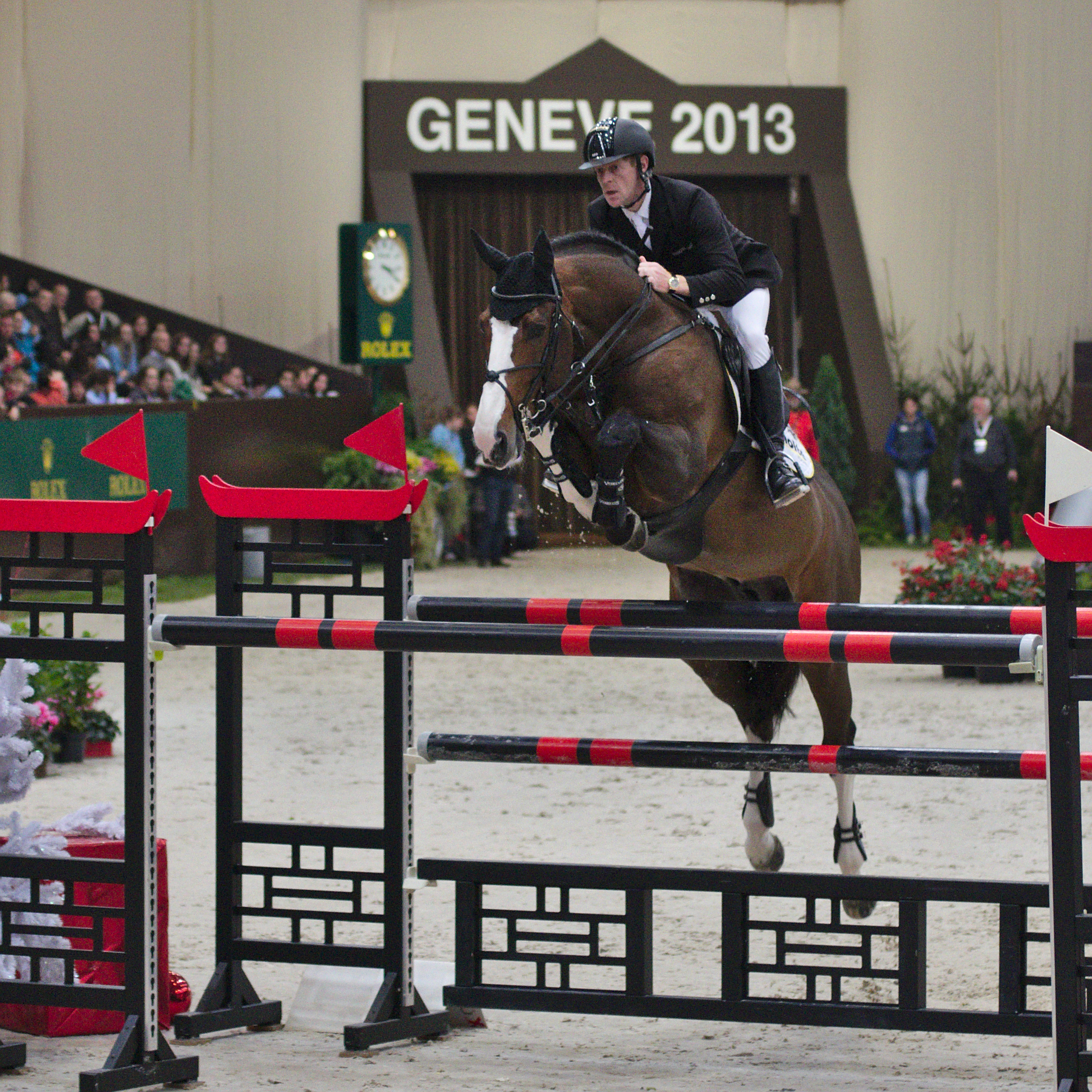 CHI Genève 2013 - 20131215 - Marcus Ehning et Plot Blue